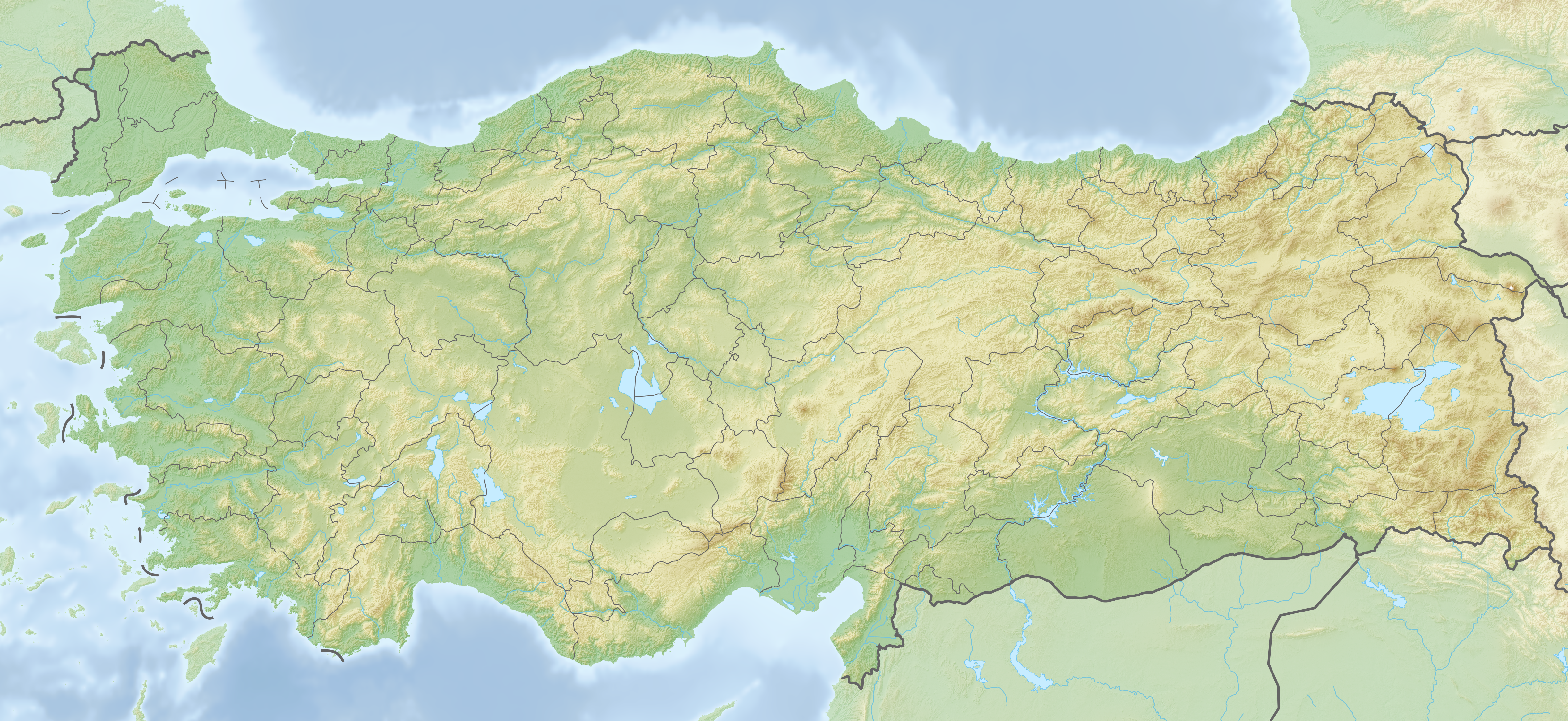 Reliefkarte Türkei Topographischer Hintergrund: NASA Shuttle Radar Topography Mission (public domain). SRTM3 v.2.